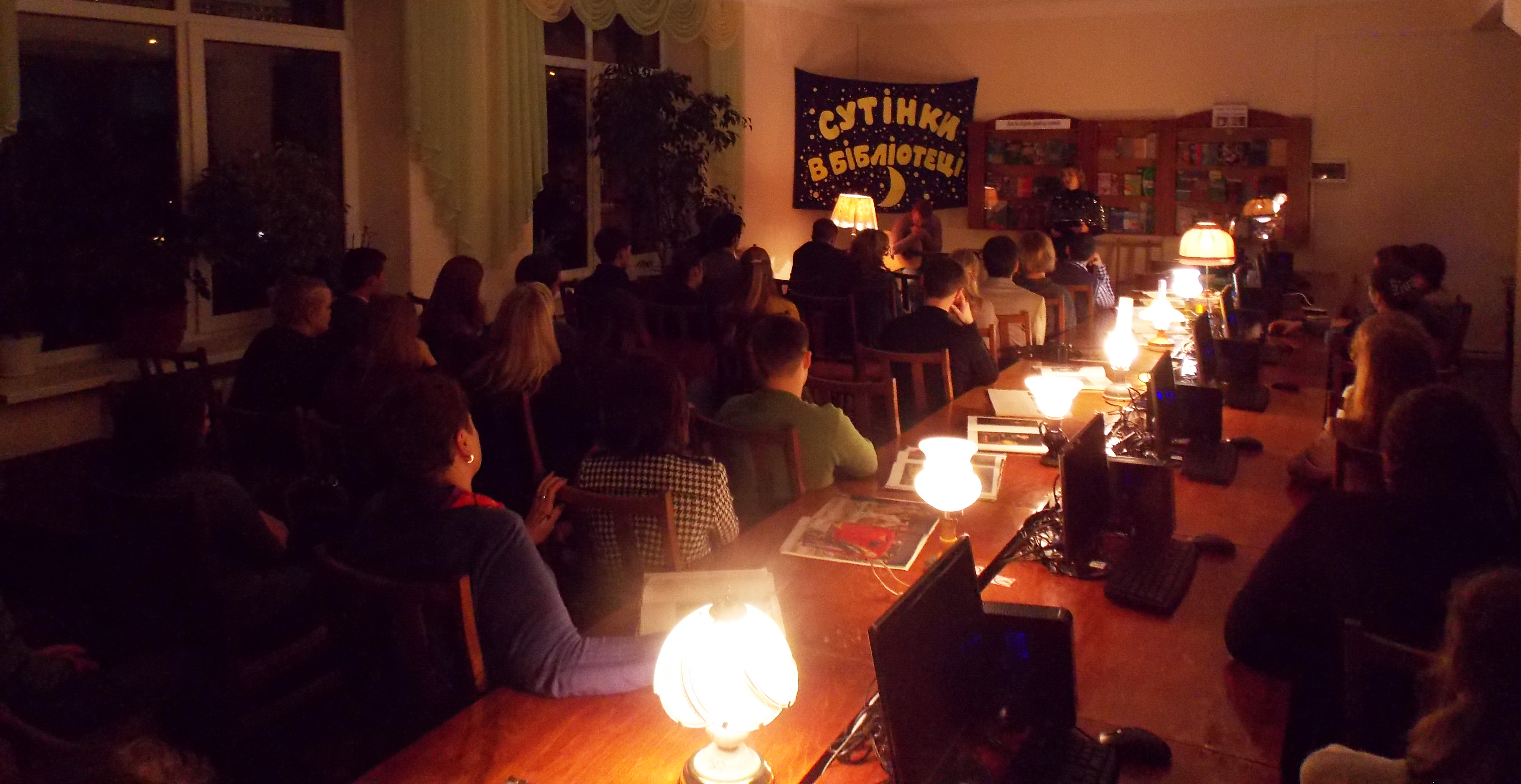 Сутінки в бібліотеці